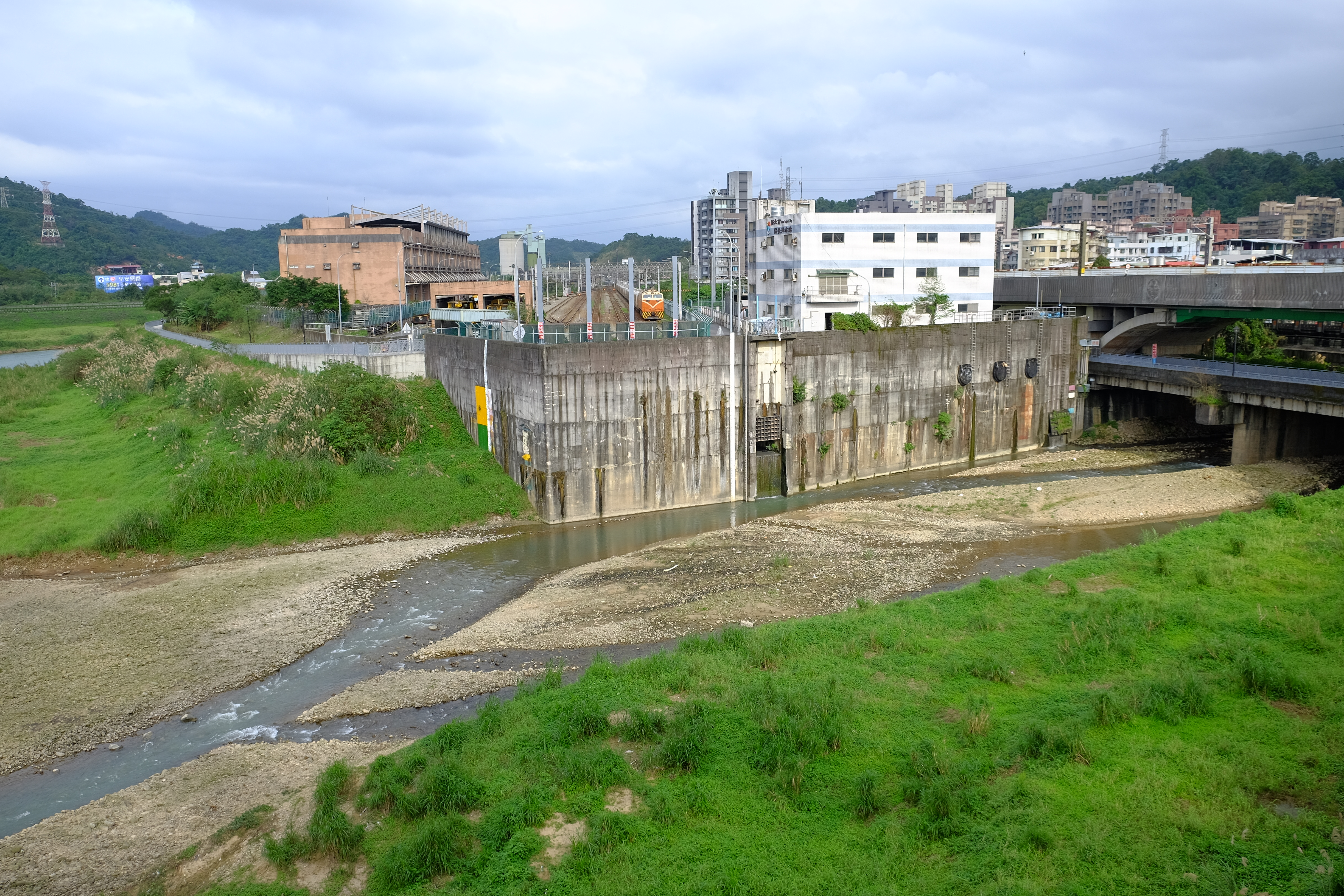 交通部鐵路改建工程局設於臺灣鐵路管理局五堵貨場旁的局舍（左前）、新北市保長抽水站（右前），前方是保長坑溪。